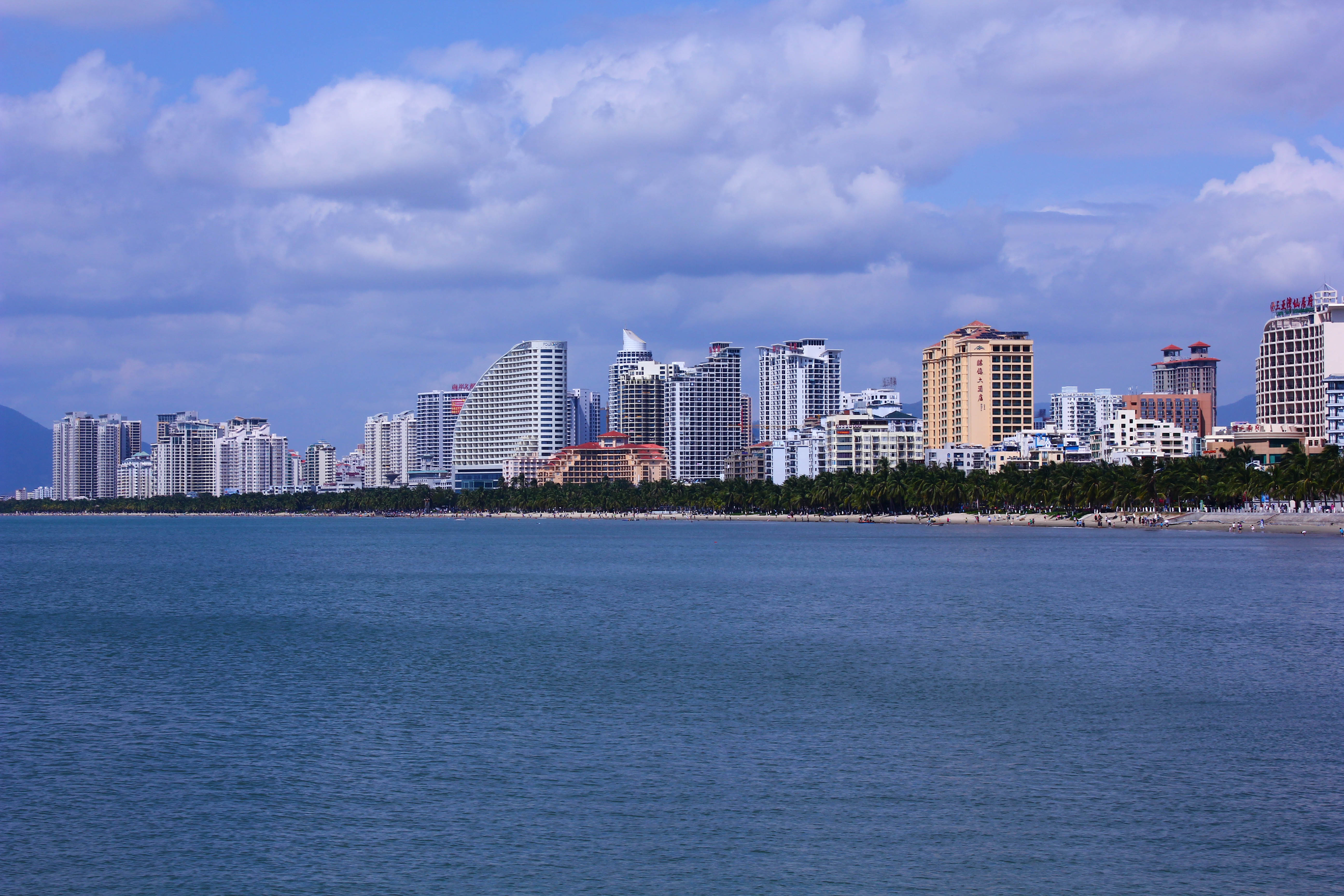 三亚湾沿岸。